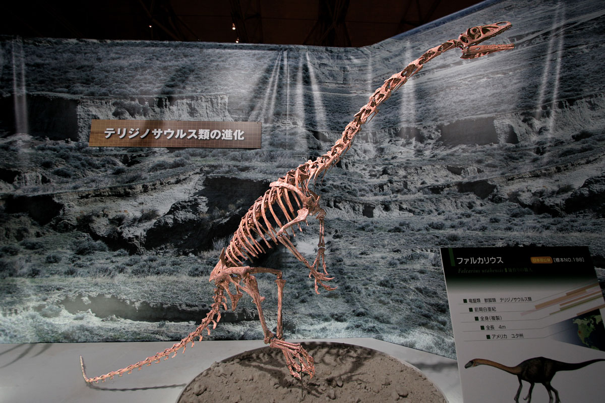 Falcarius - 01